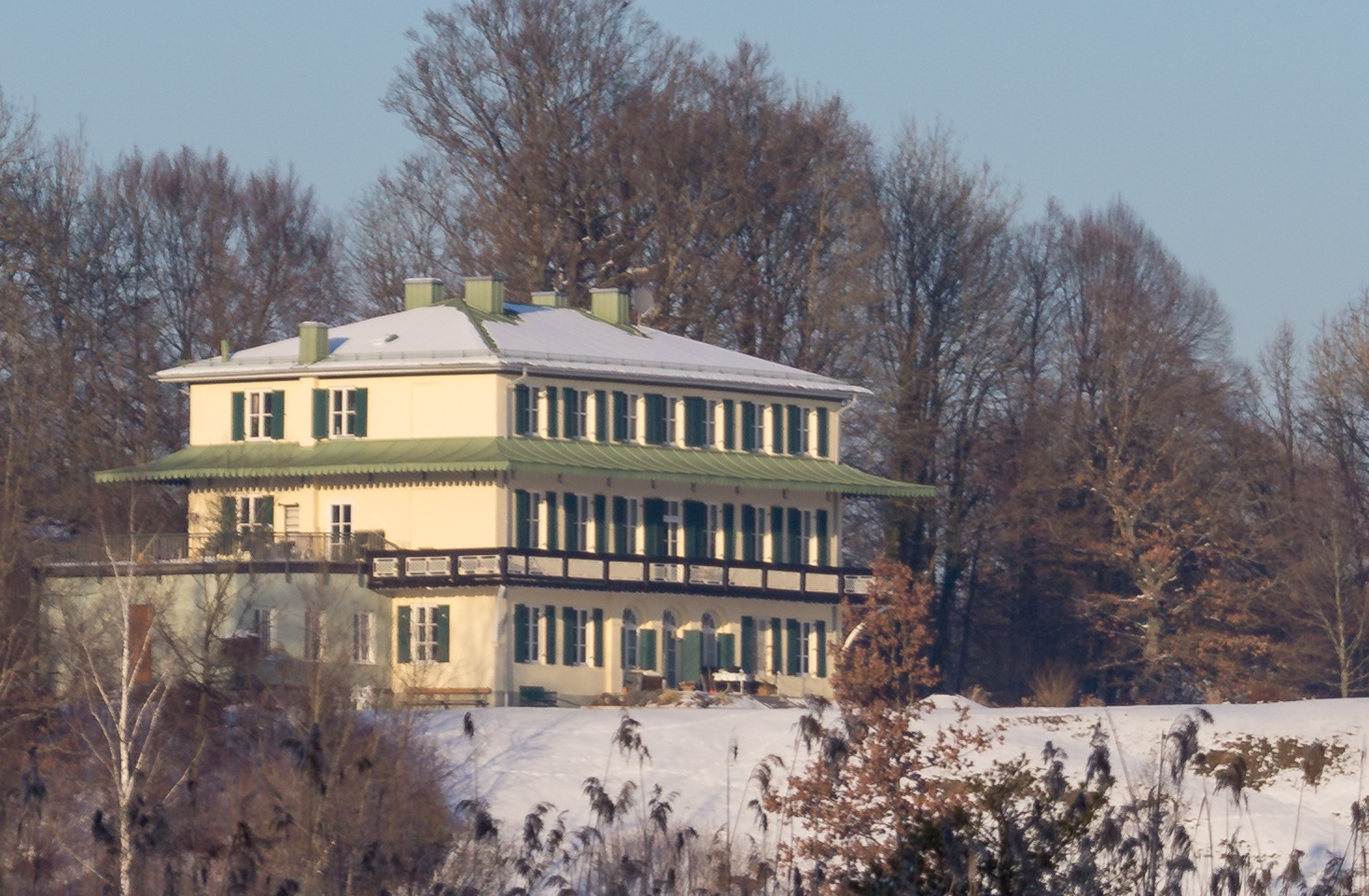 Villa (ehem. Maffei) in Iffeldorf, Ortsteil Staltach vom zugefrorenen Fischkalter aus. Adresse: Gut Staltach 1